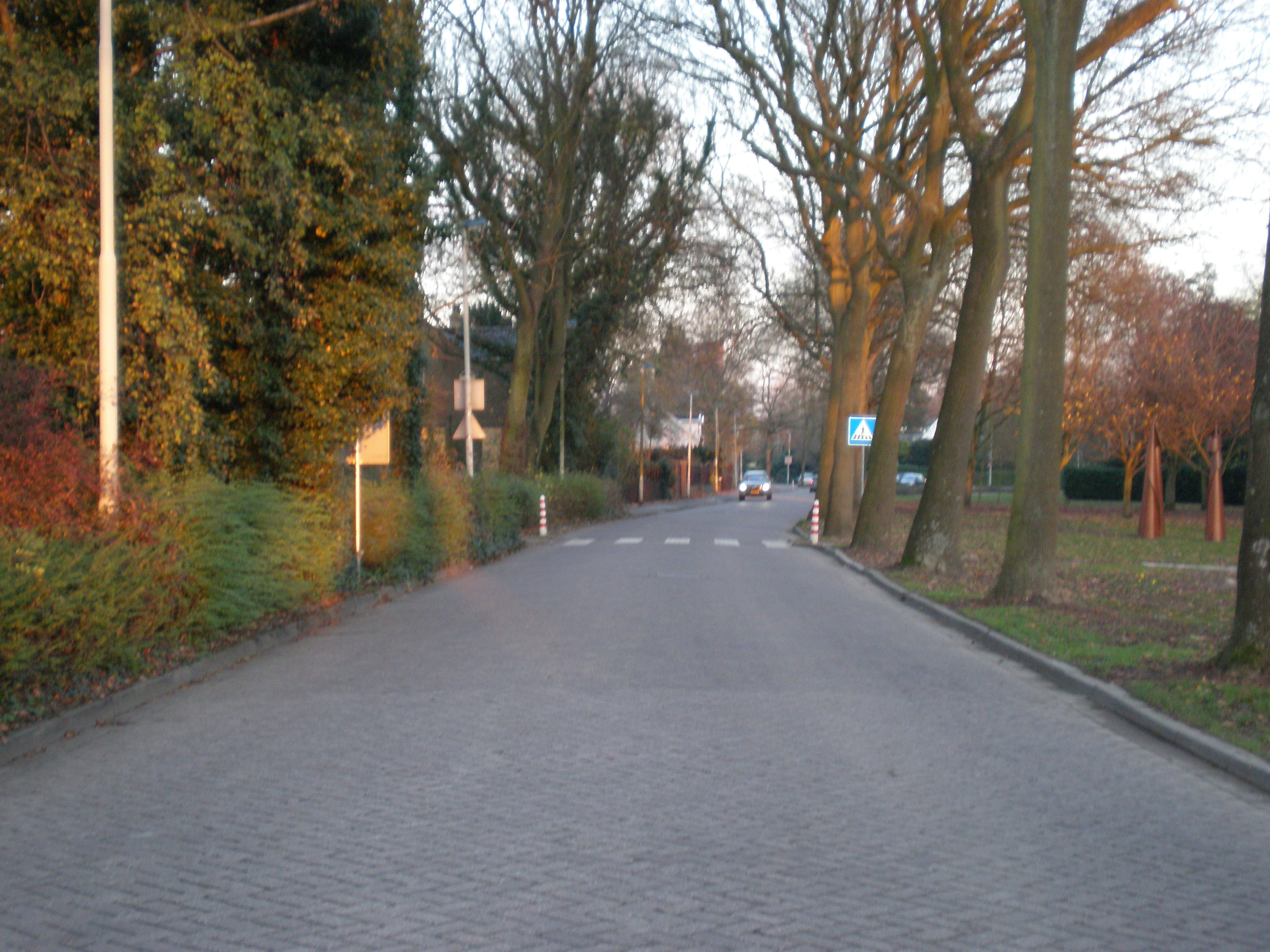 De Rijsdijk te Rhoon tussen Viaductweg & Kleidijk